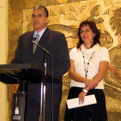 Ceremonia de Entrega del premio Arturo Barea 2008 a Manuel Dáiz Ordóñez y María Jesús Milán Agudo